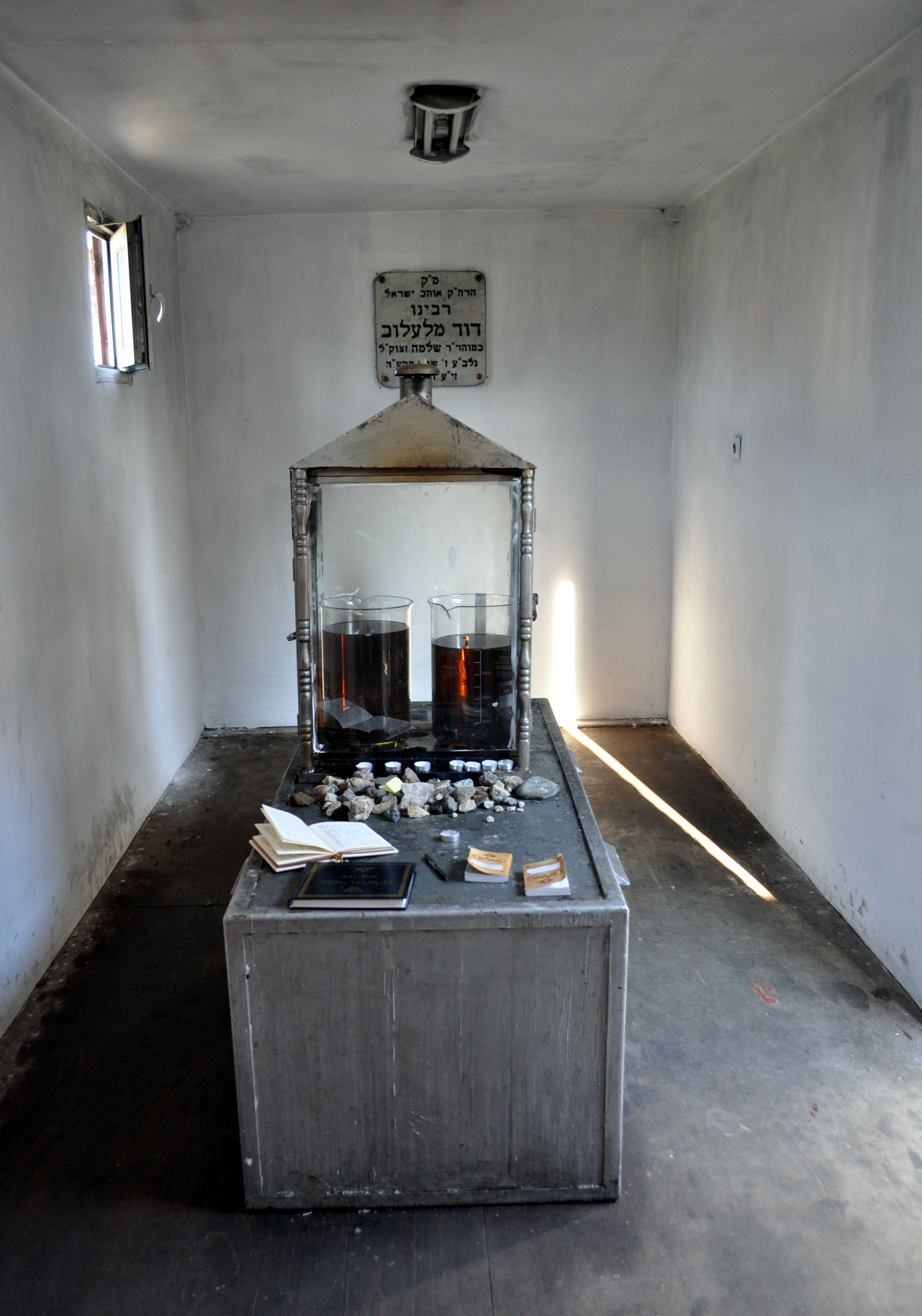 Ten obiekt znajduje się w Ewidencji Miejsc Pamięci Województwa Śląskiego dla miejscowości Lelów pod numerem 109/21.Opis